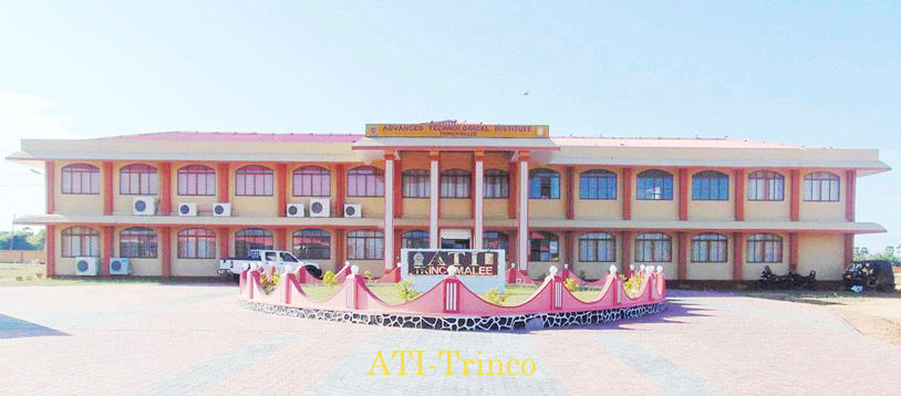 திருகோணமலை உயர் தொழில்நுட்ப நிறுவனம் இலங்கை